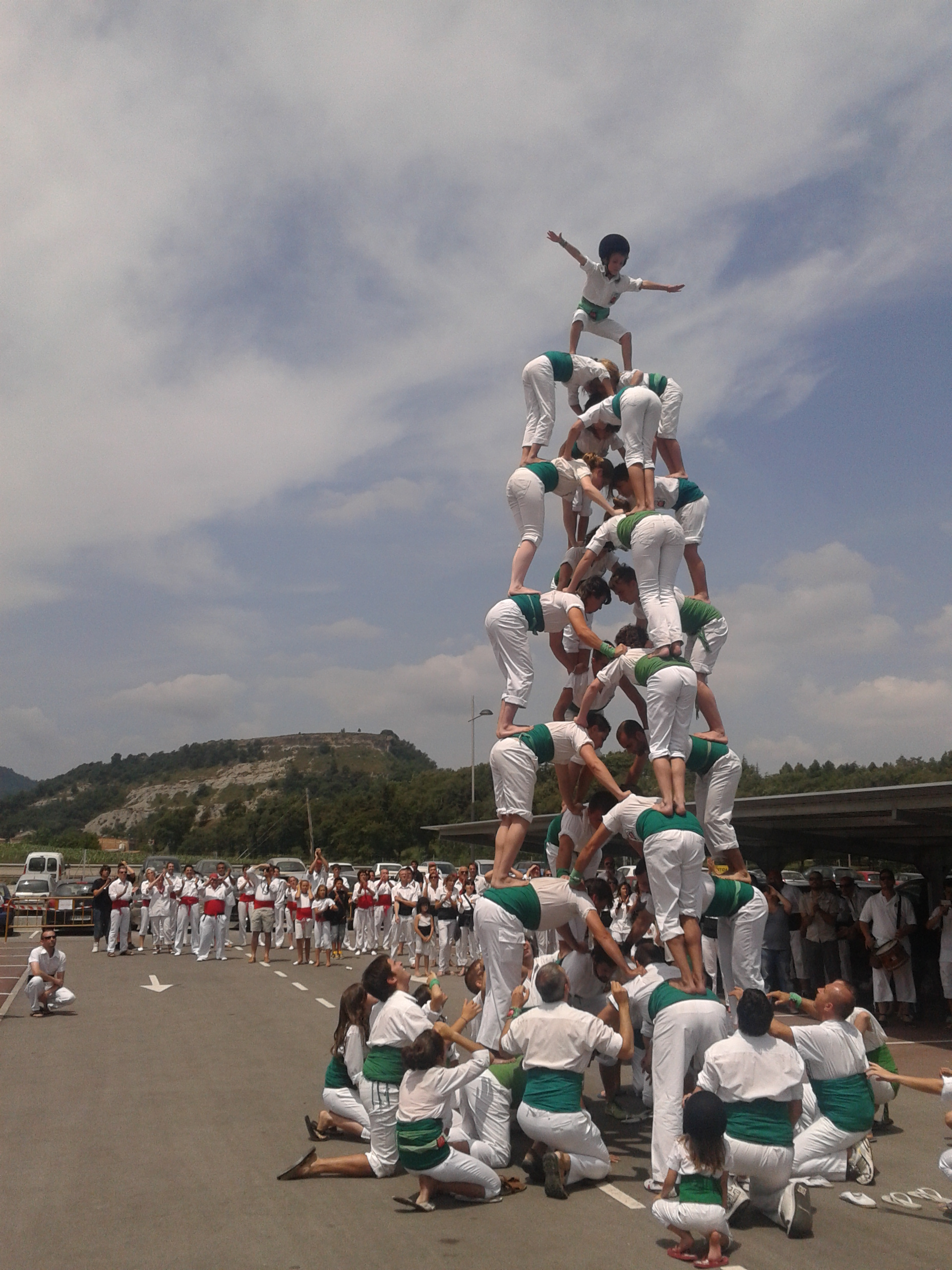 Pira 6x5 dels Falcons de Vilafranca a la població de Malla en la X Trobada Nacional de Falcons.